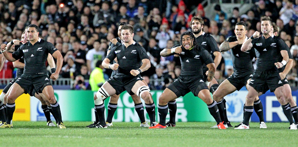 COUPE DU MONDE DE RUGBY 2011 NOUVELLE ZELANDE ARGENTINE